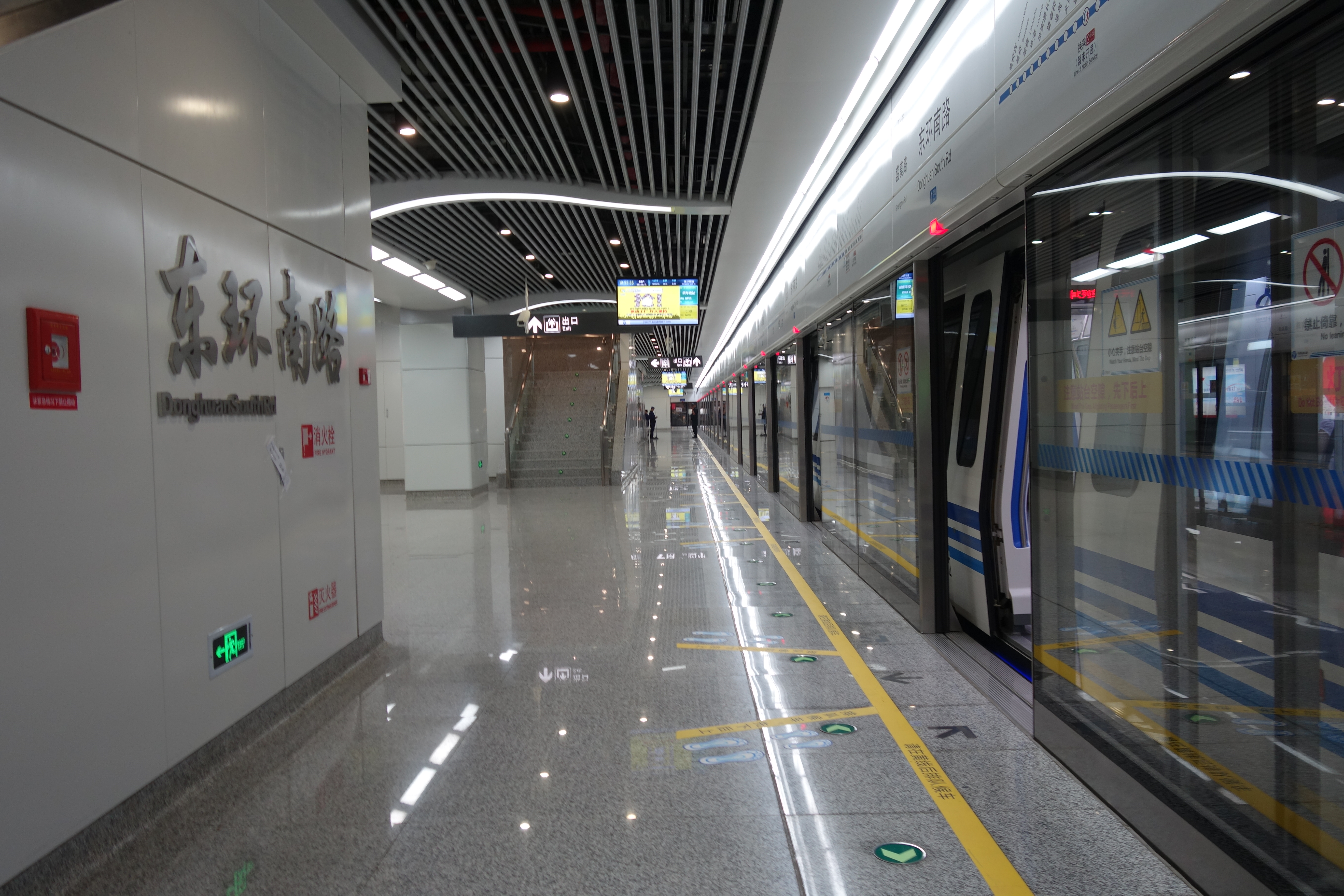 东环南路站站台